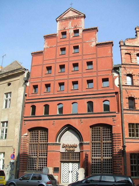 Stralsund,_Germany,_Scheele-Haus_(2006-09-29)